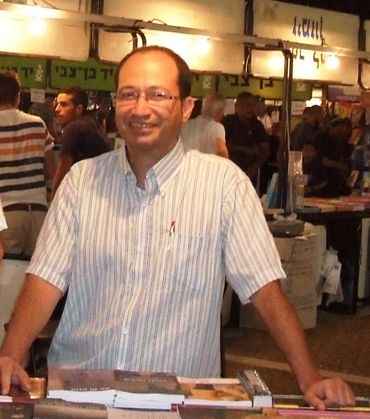 הסופר בשבוע הספר בכיכר רבין